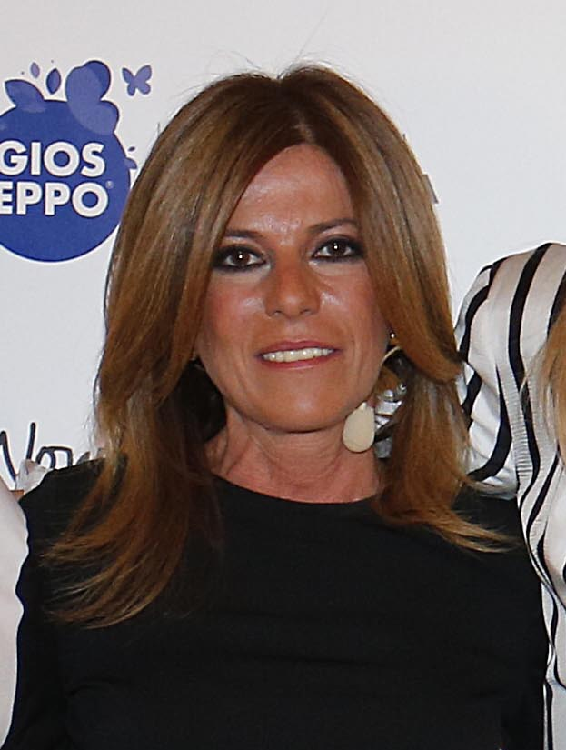 Durante mi participación en el encuentro 'Women for Change' he hecho un llamamiento para lograr la igualdad real de oportunidades entre hombres y mujeres. La prevención y el apoyo a las víctimas de violencia es una prioridad que todos debemos asumir porque se trata de una cuestión de educación y respeto, sin los cuales estamos abocados al abismo.